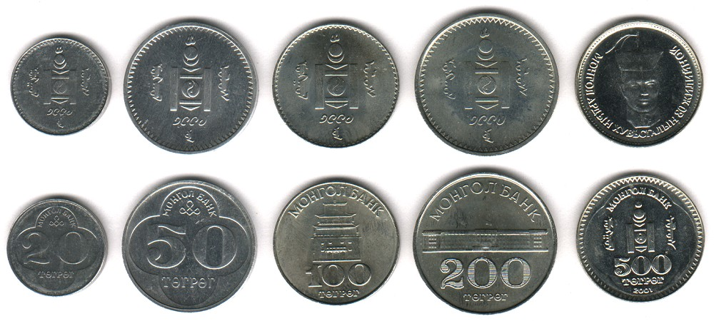 Tugrik mongol